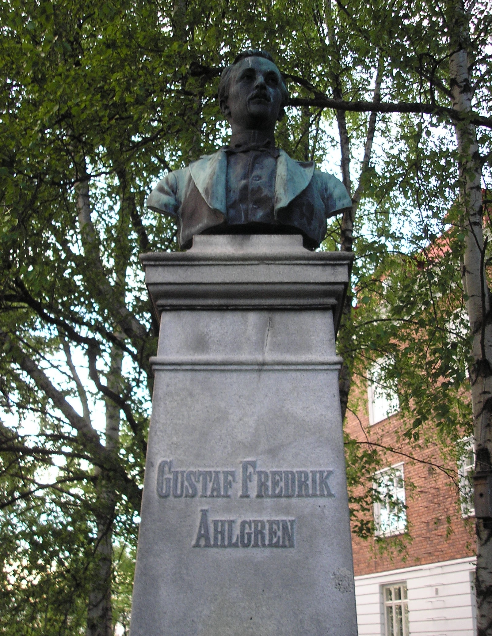 Gustaf Fredrik Ahlgrenin rintakuva (1888) - Emil Wikström. Sijainti: Koukkuniemen vanhainkoti, Rauhaniementie 19